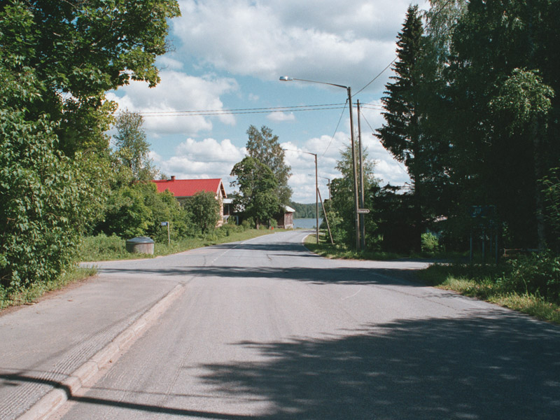 Lavian raitti